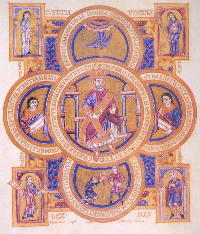 Herrscherbild Heinrich II. (Heinrichs III.?) im Evangeliar aus Montecassino (Rom, Bibl. Vat., Cod. Ottob. lat. 74, fol. 193v.)